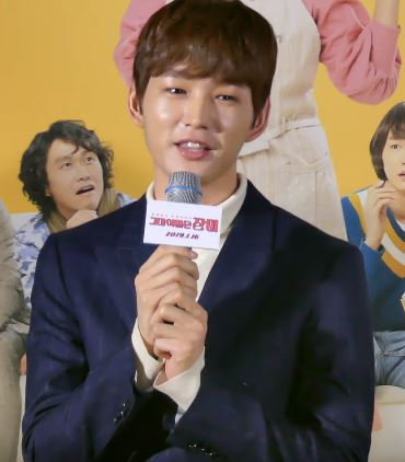 3일 오후 서울시 용산구 CGV용산아이파크몰에서 영화 '그대 이름은 장미' 언론시사회 및 기자간담회가 열려 배우 유호정, 박성웅, 오정세(하연수, 이원근, 최우식) 채수빈이 참석해 캐스팅 소감에 대해 설명 하고 있다.